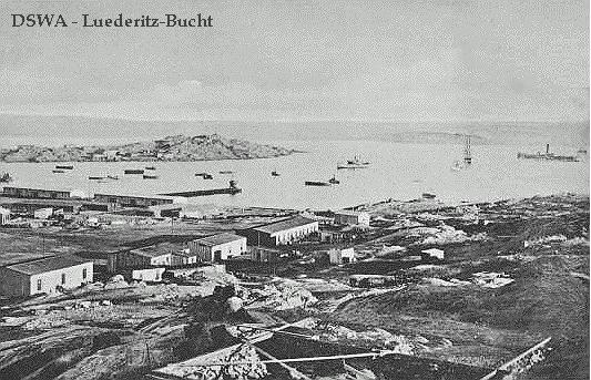 Lüderitzbucht or Lüderitz Bay about 1900